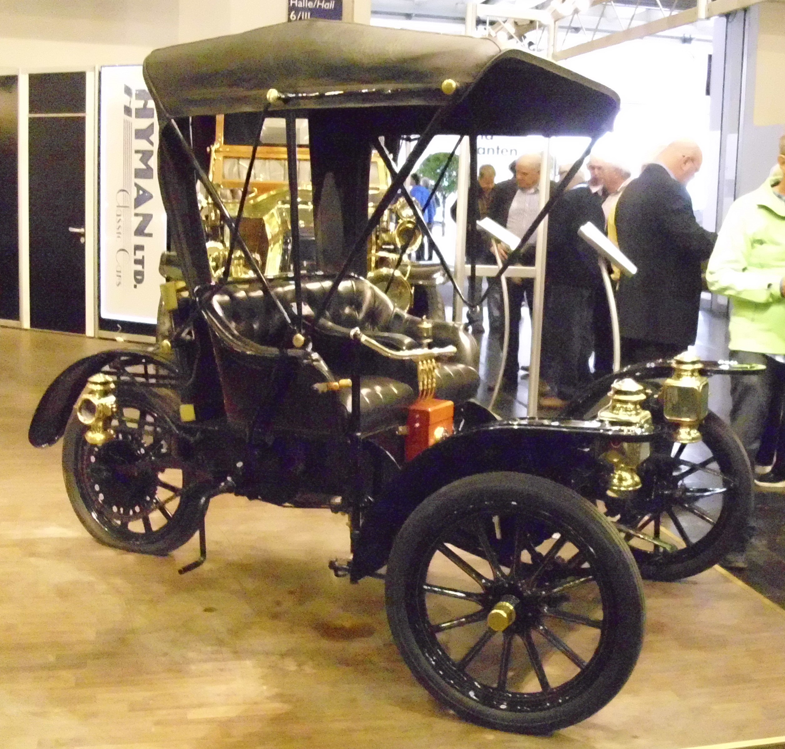 Motorette 10 HP 1911